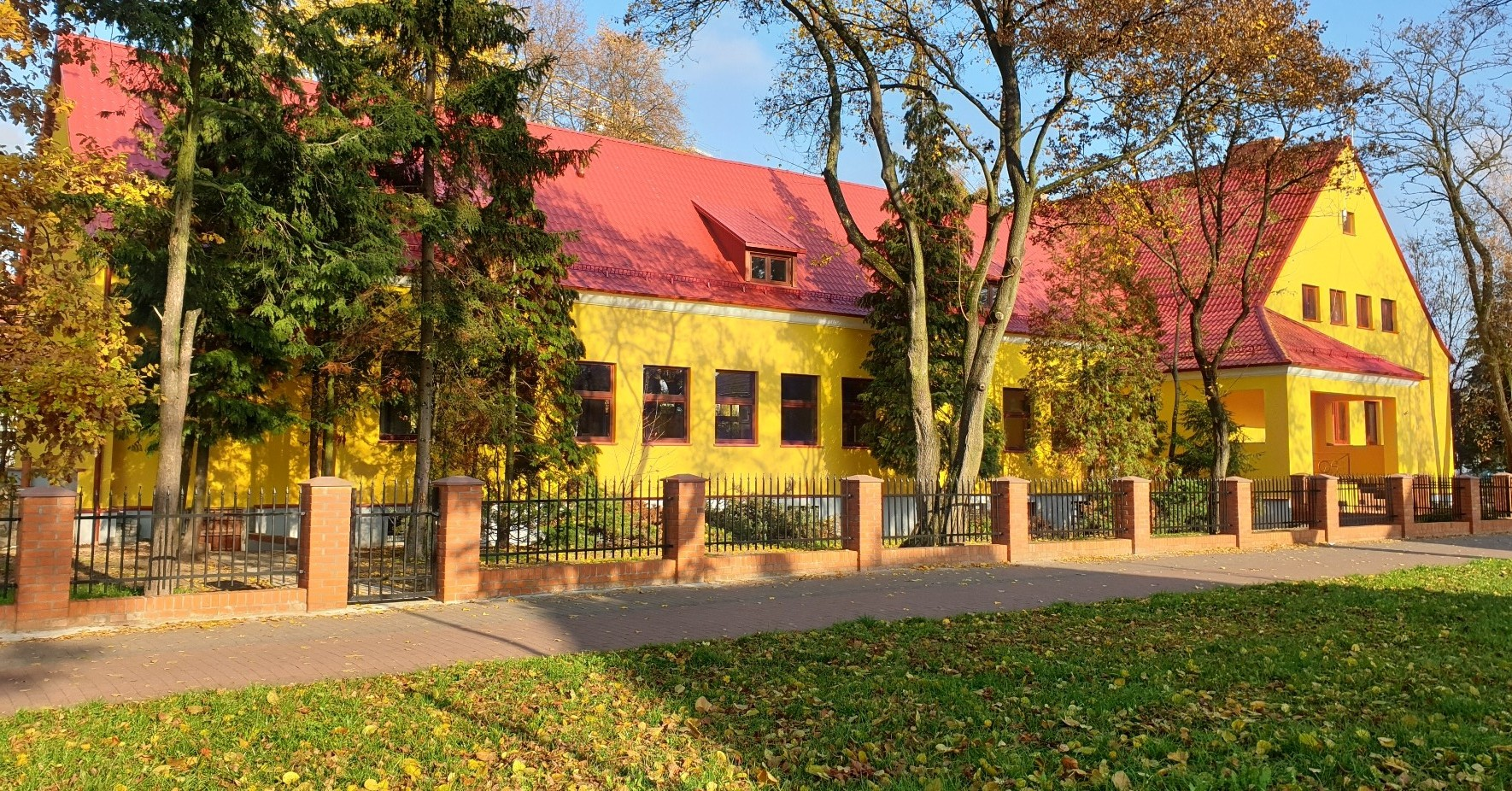 Stargard, 2019. Klub żołnierski 12BZ